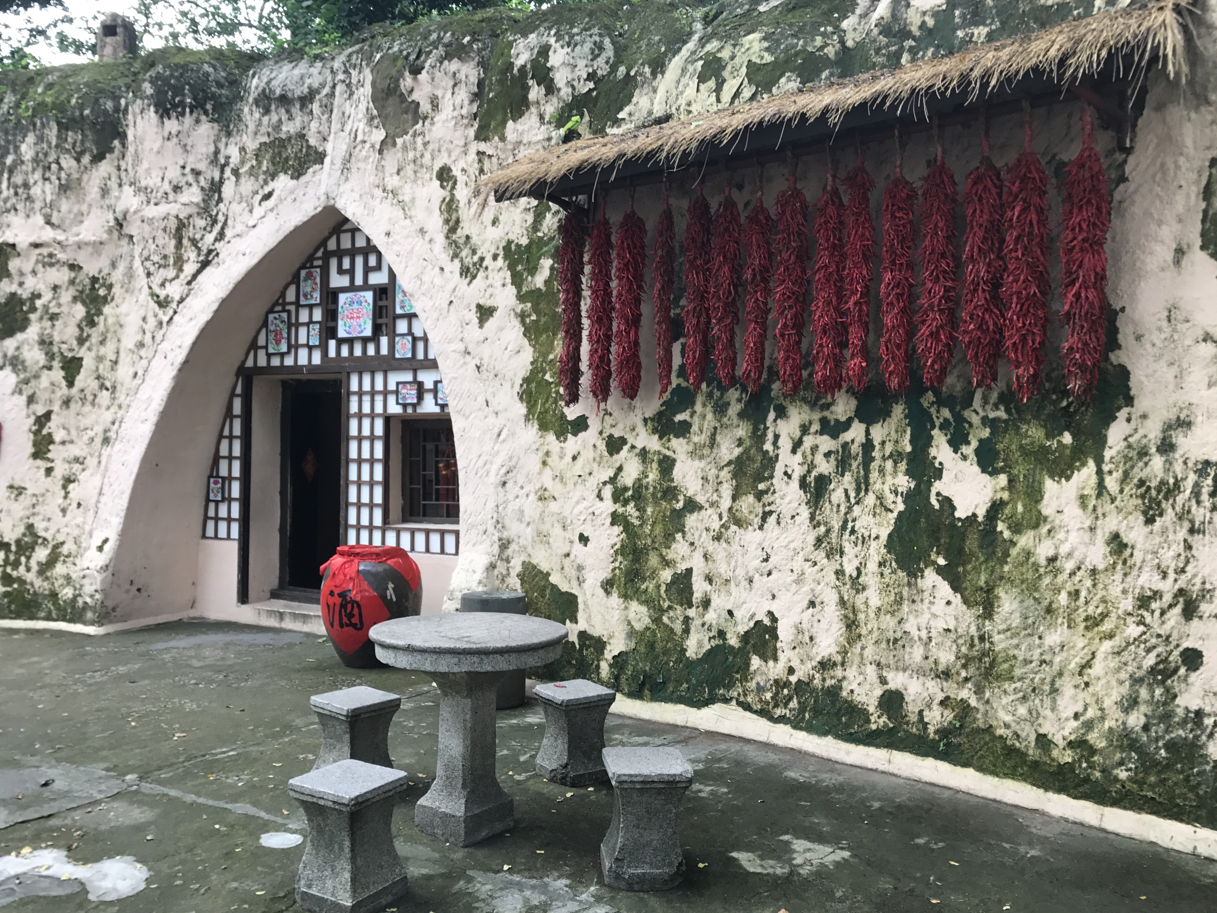 錦繍中華民俗村